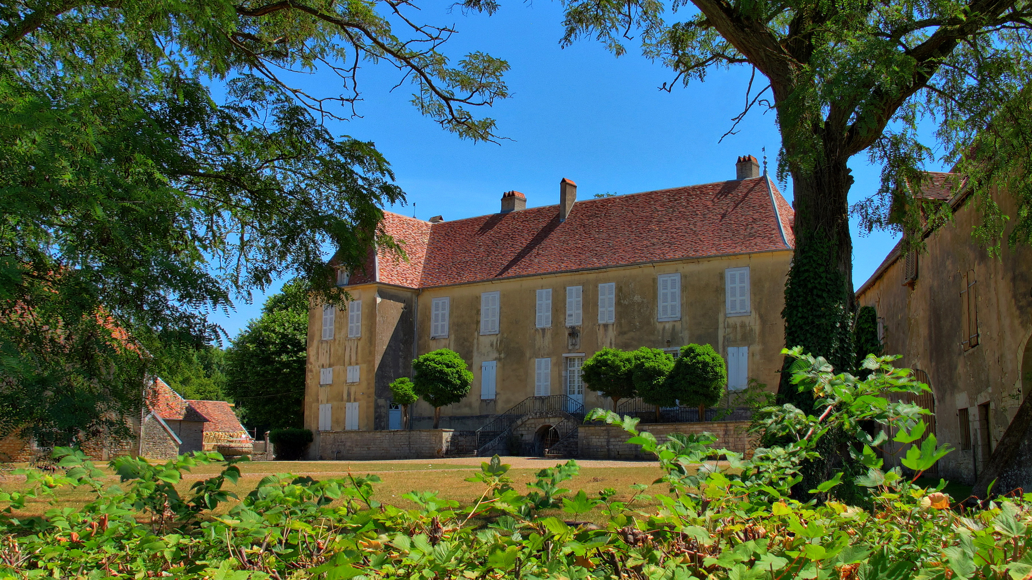 Inscrit aux monuments historiques sous le numéro PA00102294